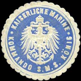 Sealing stamp Title: Kaiserliche Marine - Kommando der S.M.S. König Description: blau, weiß, geprägt Place: size: 4 cm